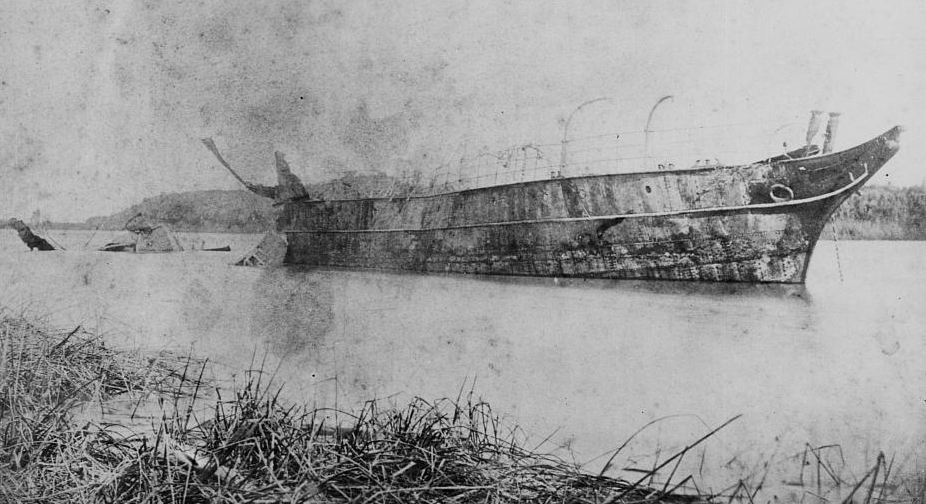 Fotografía del vapor Fulminante tras su explosión